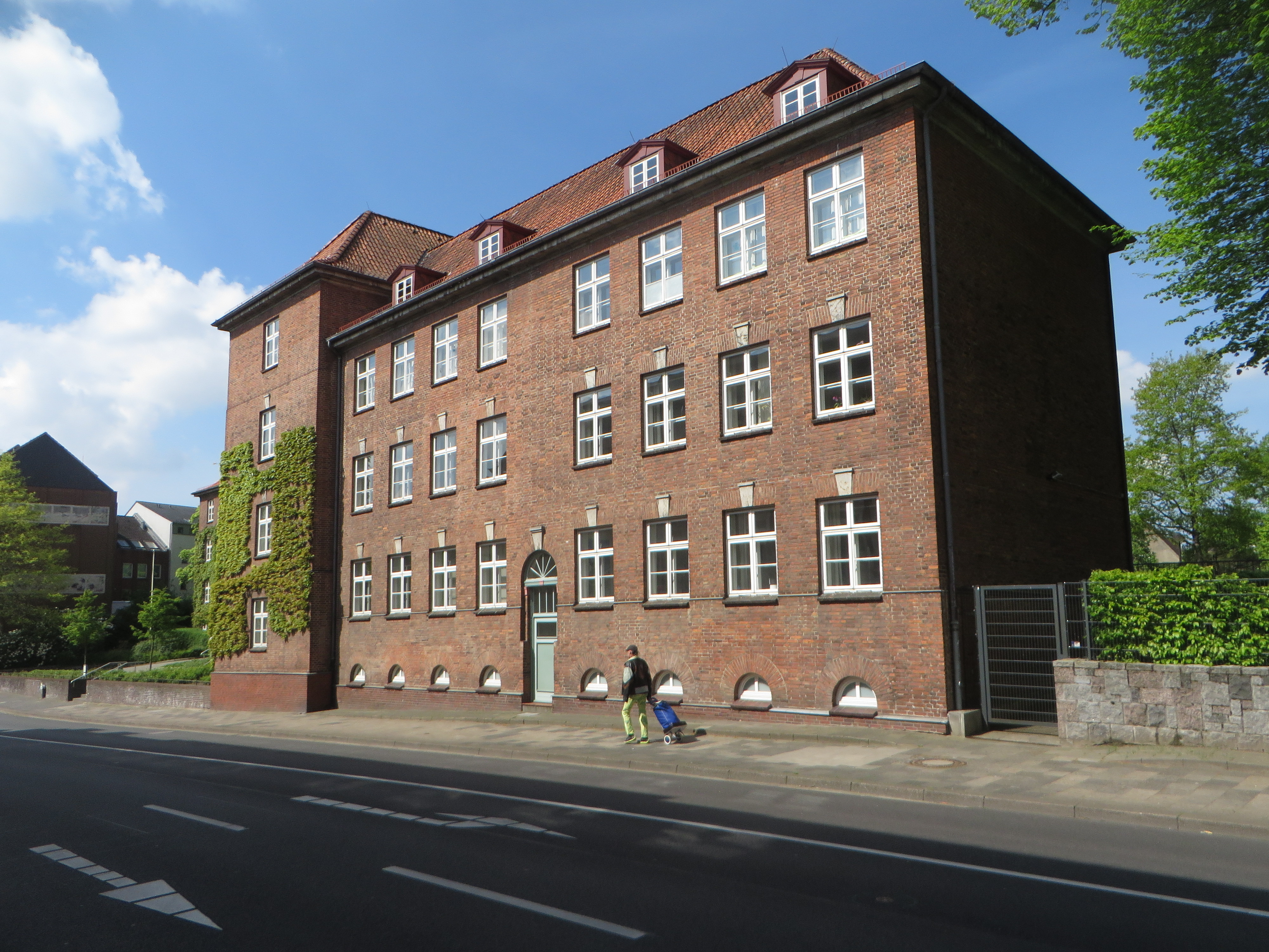 Finanzamt Flensburg (Mai 2017), Bild 01